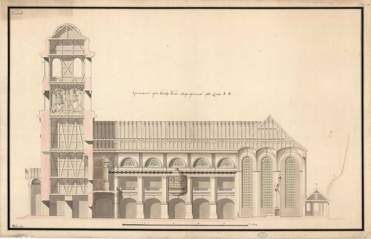 St. Nikolaj Kirke. Opmåling. Langsnit. "Gennemsnit af Nicolaj Kirke langs igiennem efter Linien A. B."